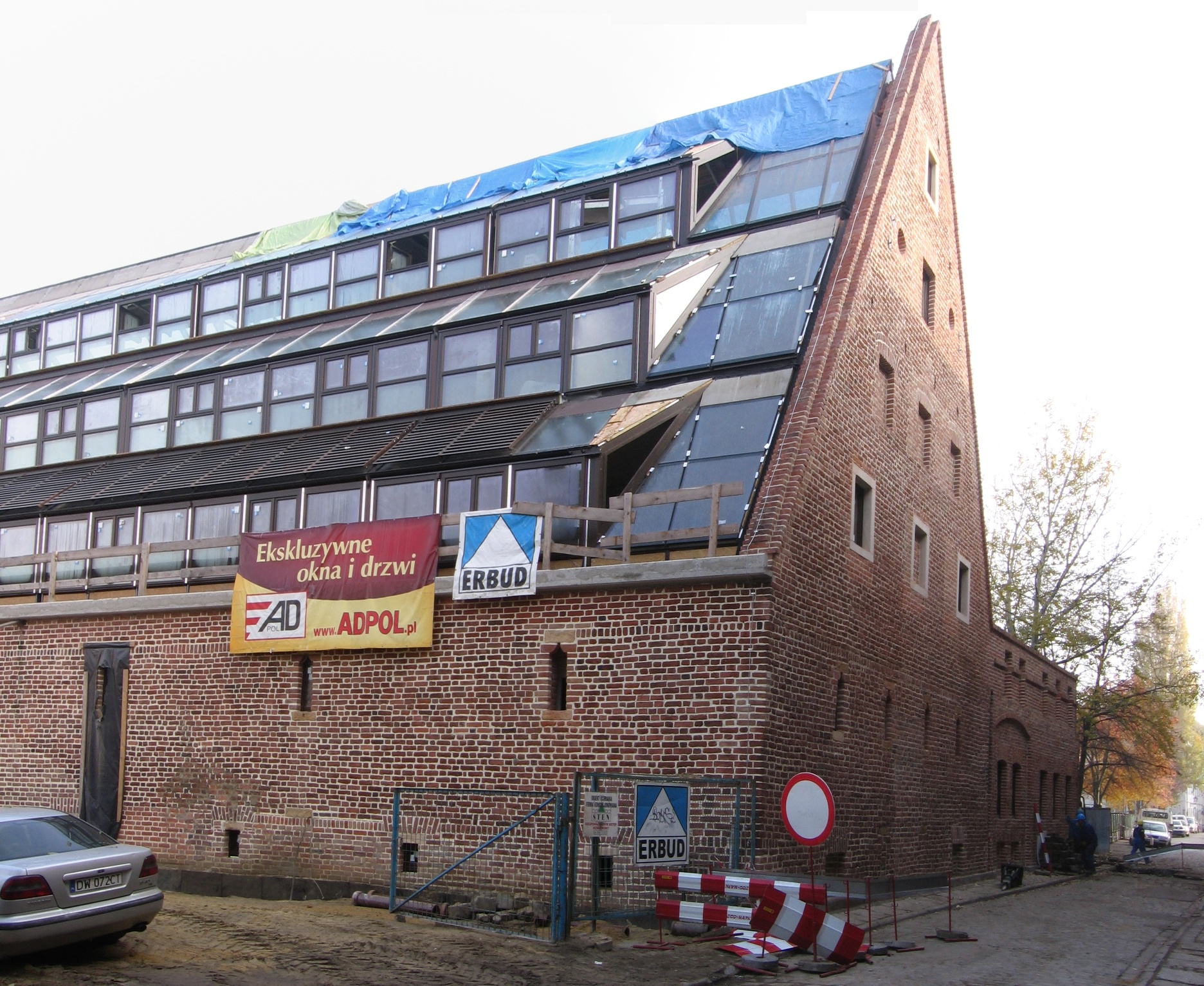 Przebudowa starej Słodowni Pańskiej (Herren-Malzhof) przy ul. Menniczej we Wrocławiu na hotel